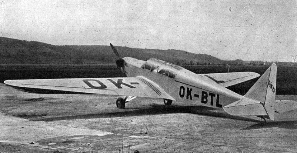 Zlín Z-XII s motorem Persy (1935)